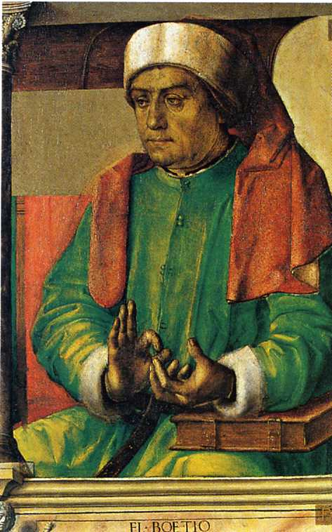 Fl Boetio (Flavio Boezio) - Studiolo di Federico da Montefeltro